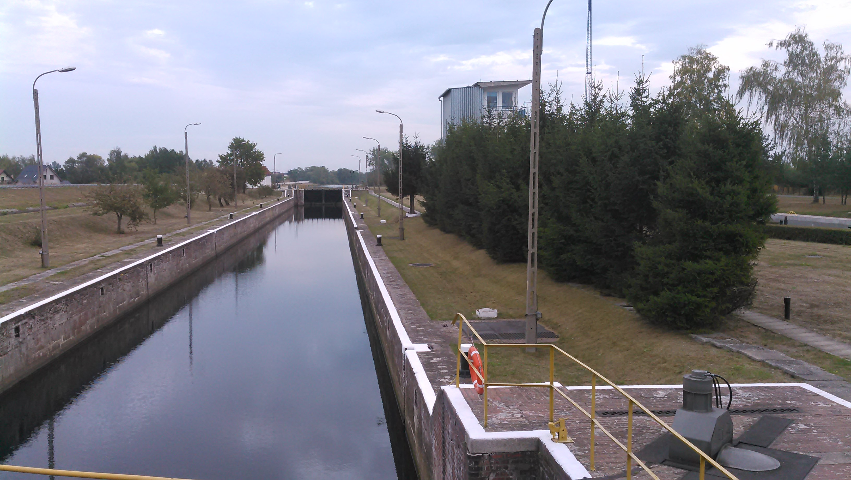 Komora Śluzy Janowice od strony zachodniej